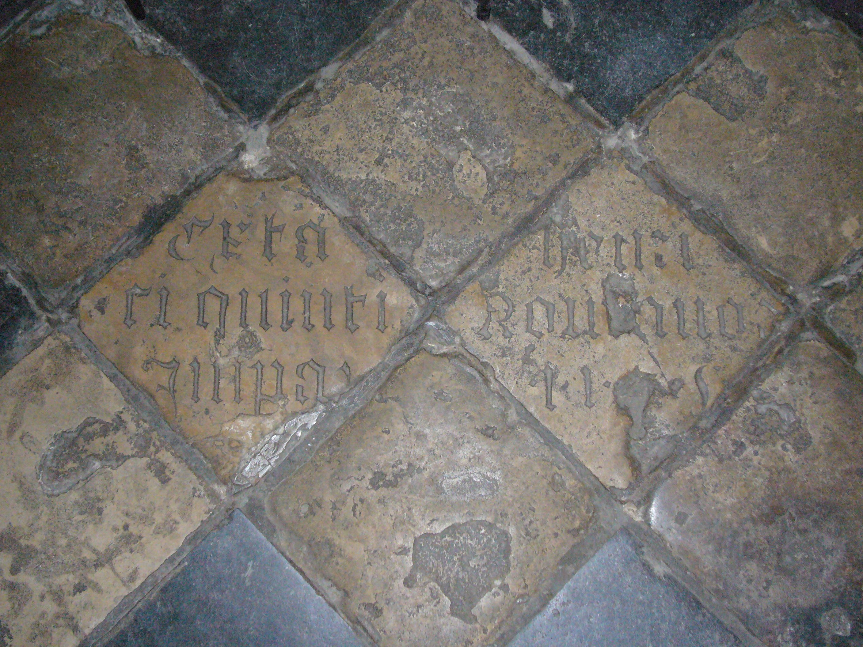 Keizerssteentjes in de Dom van Utrecht